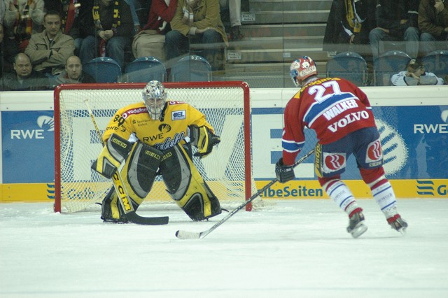 Torwart Robert Müller